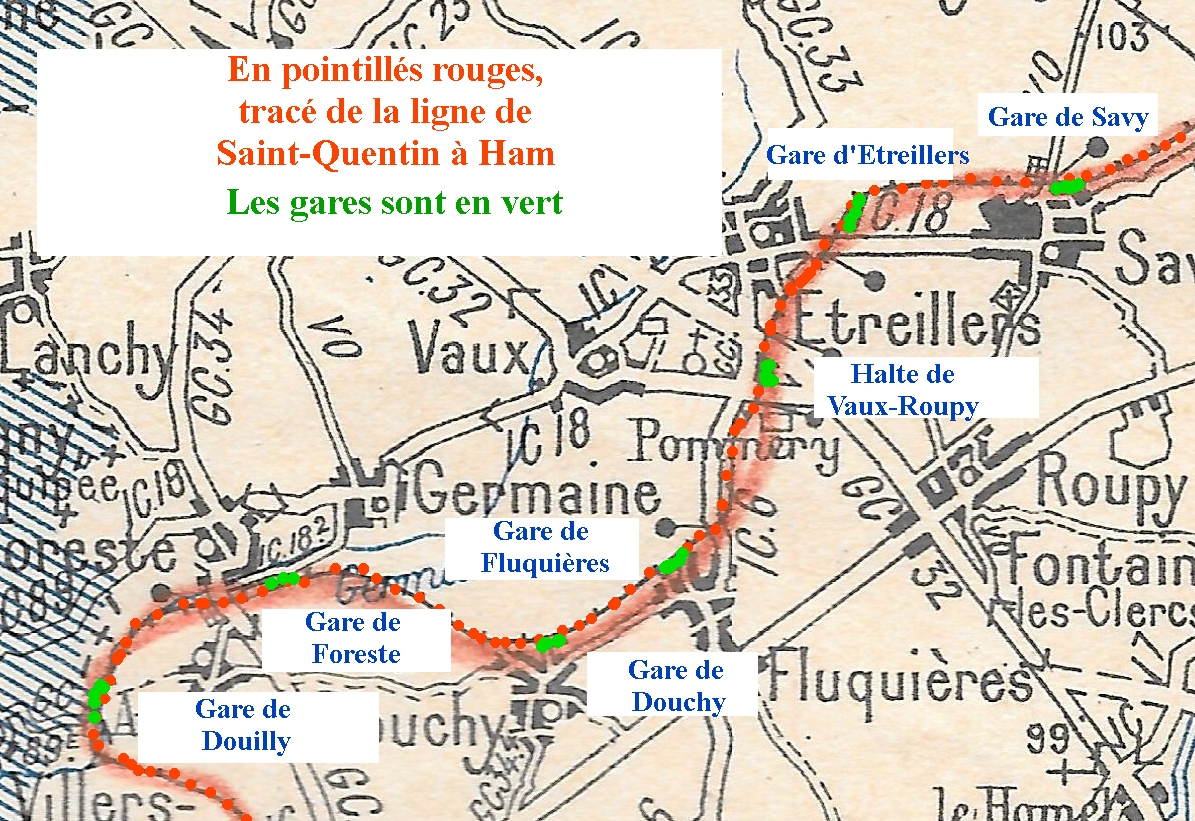 Carte de la ligne de Saint-Quentin à Ham Partie 2